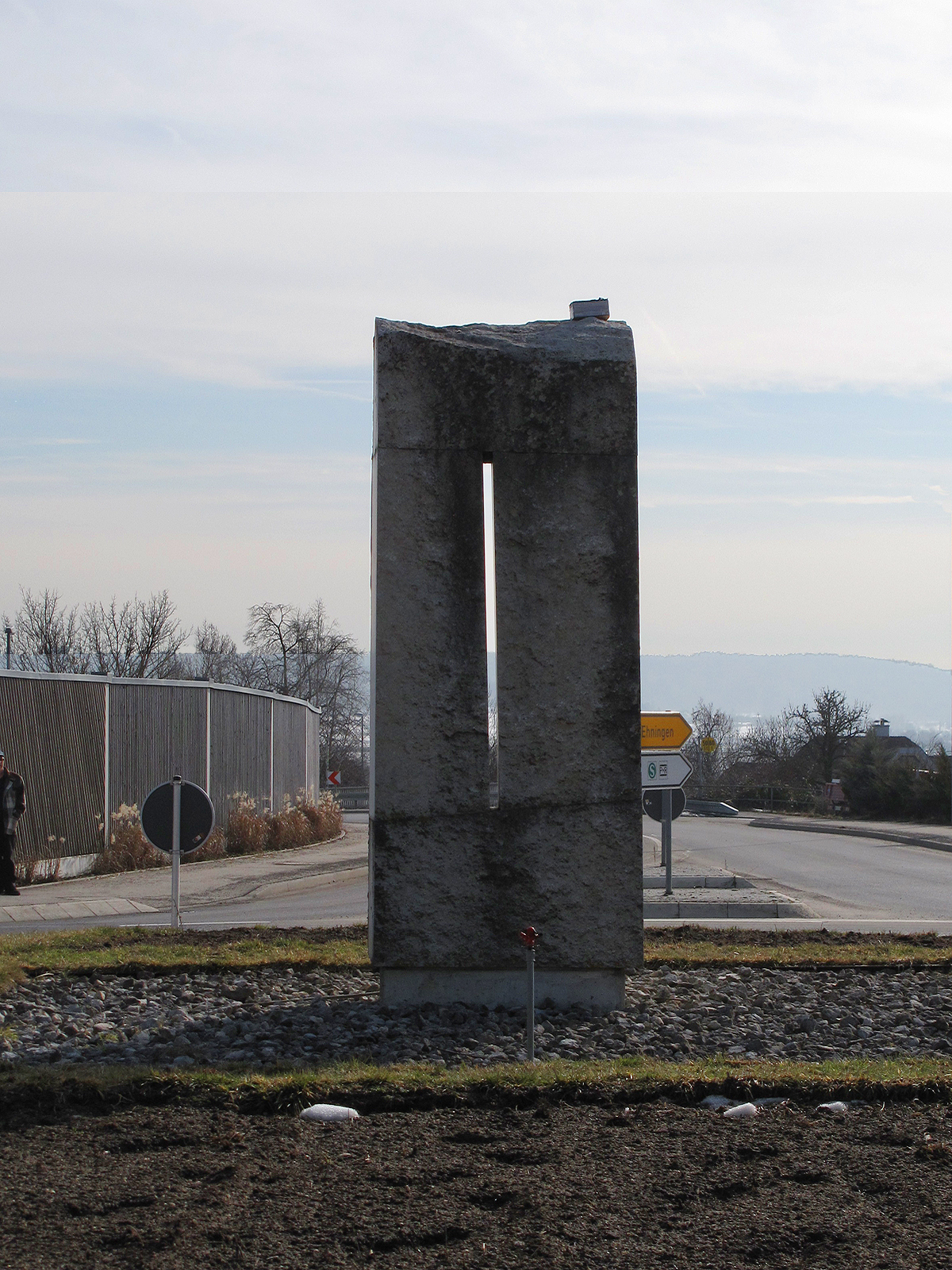 Johannes Kares, Sonnenstelle, 2004, - Ehningen, Verkehrskreisel Dagersheimer Straße/Bühlallee